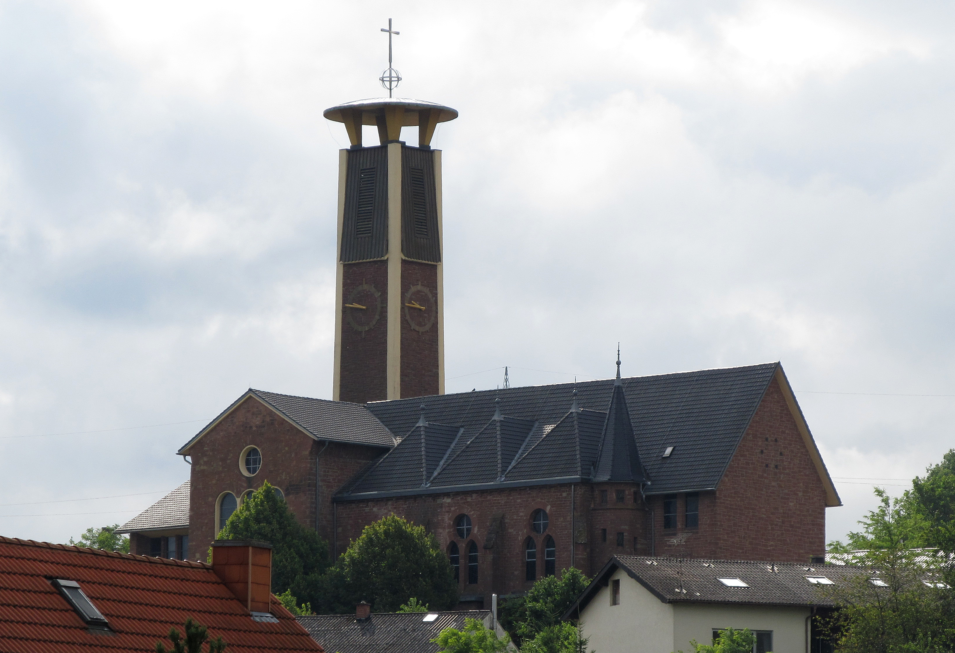 Die katholische Pfarr- und Wallfahrtskirche Mariä Himmelfahrt in Kirrberg, Saarland